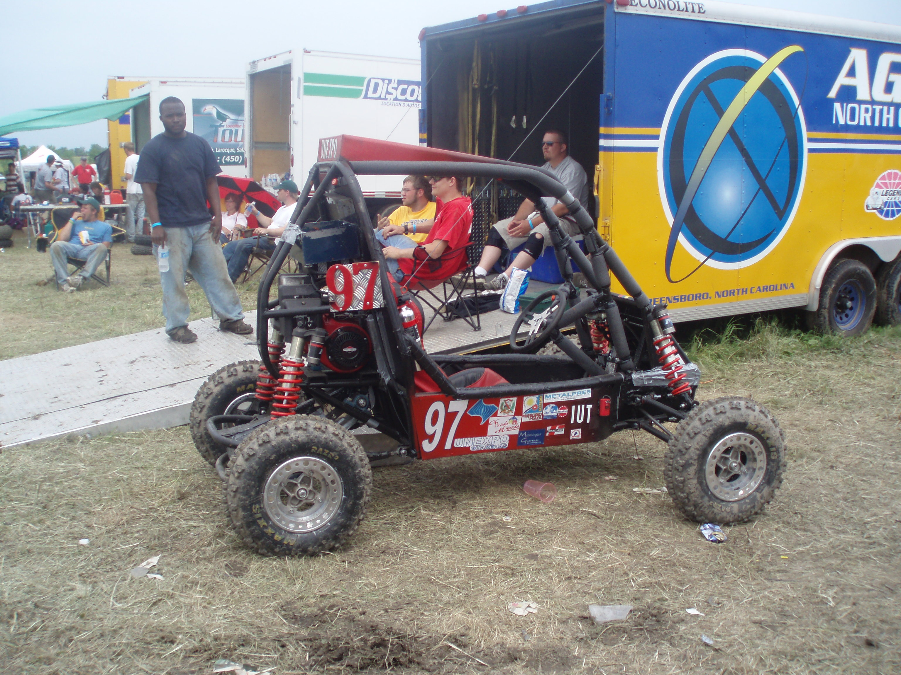 Primer prototipo BAJA SAE de la UNEXPO (el primer vehiculo BAJA de toda la UNEXPO.. fue creado en Guarenas)... primera participación QUEBEC-CANADA, número 97.